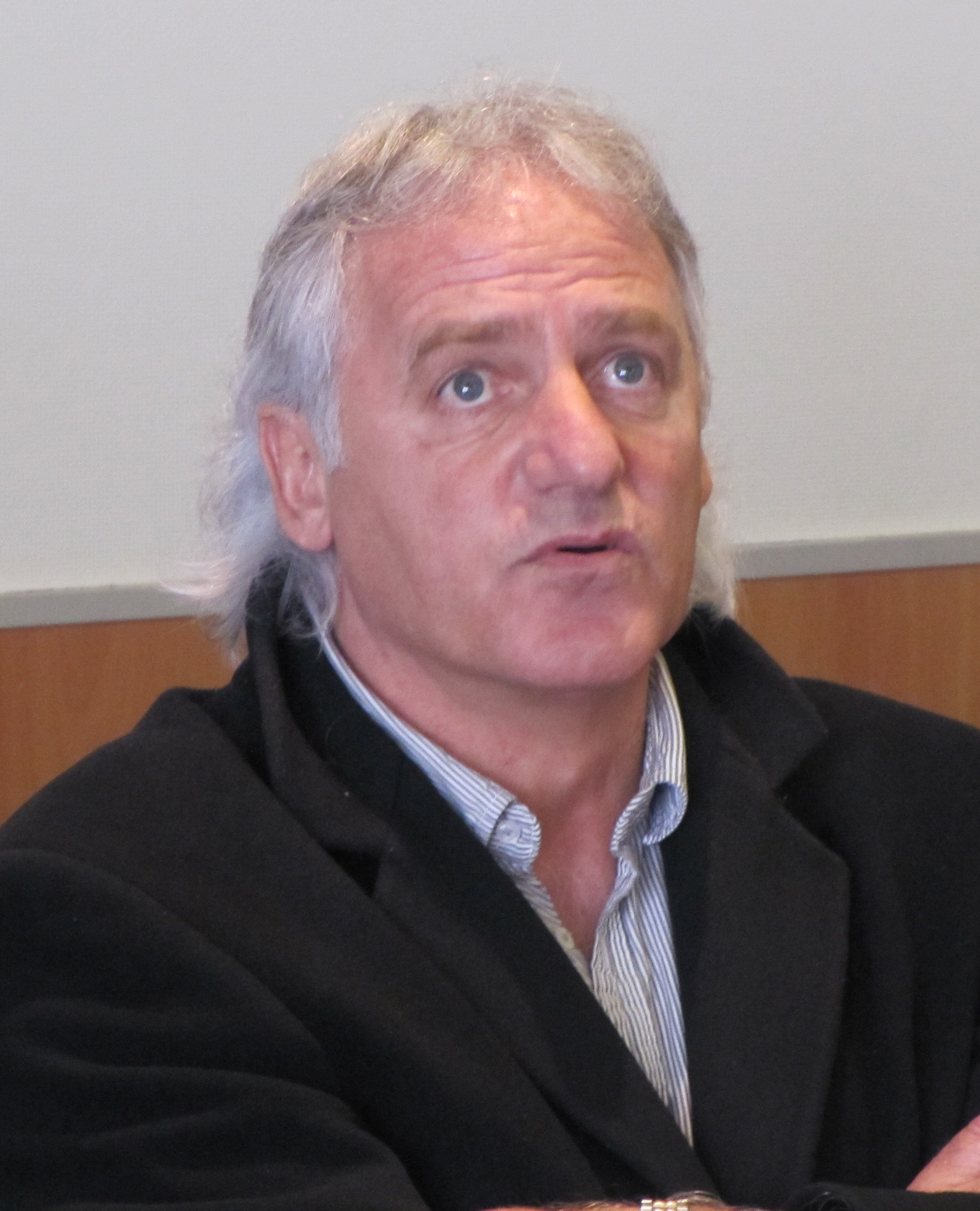 Pierrick Hiard le 11 mars 2011